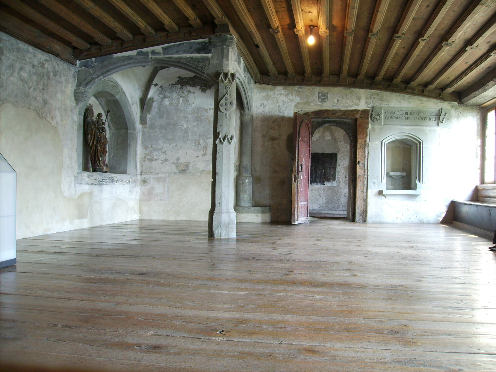 Winterrefektorium im Kloster St. Georgen. Unter dem steinernen Baldachin links stand ein Ofen, der vom Vorraum aus befeuert werden konnte. Die Wandnische rechts diente zur Aufstellung eines Lavabos. Das Kloster St. Georgen war eine Benediktinerabtei in Stein am Rhein im Kanton Schaffhausen, Schweiz. Es handelt sich um eine der am besten erhaltenen mittelalterlichen Klosteranlagen der Schweiz.